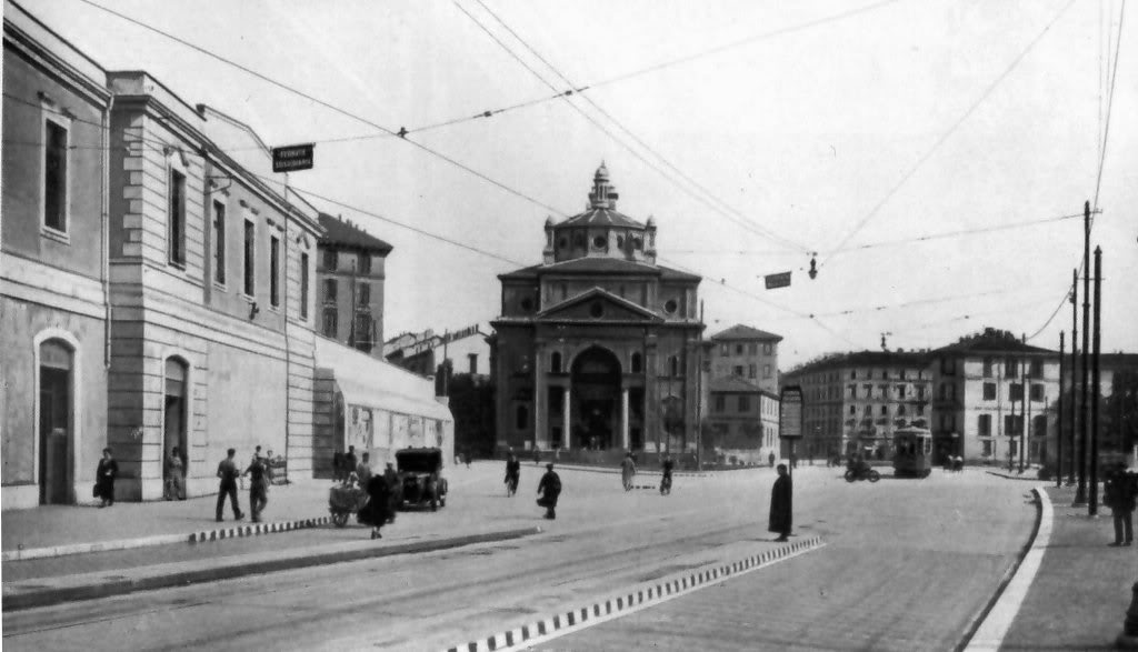 Milano, Stazione di Porta Nuova (1931). La ripresa è stata effettuata dalla via Galilei e inquadra sulla sinistra il fabbricato viaggiatori della stazione e sullo sfondo la chiesa di San Gioachimo.